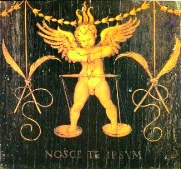 Amore sulla Bilancia (Amor Sapientiae): tarsia lignea del coro della Basilica di Santa Maria Maggiore in Bergamo, opera di Giovan Francesco Capoferri su disegno di Lorenzo Lotto. Amore è in piedi su una bilancia in perfetto equilibrio, con le ali aperte ascendendo verso l'alto. Tre fiamme simboleggiano il fuoco sacro della purificazione. La scritta in basso, Nosce te ipsum ("Conosci te stesso") è il motto socratico che invita a ricercare la sapienza in se stessi.